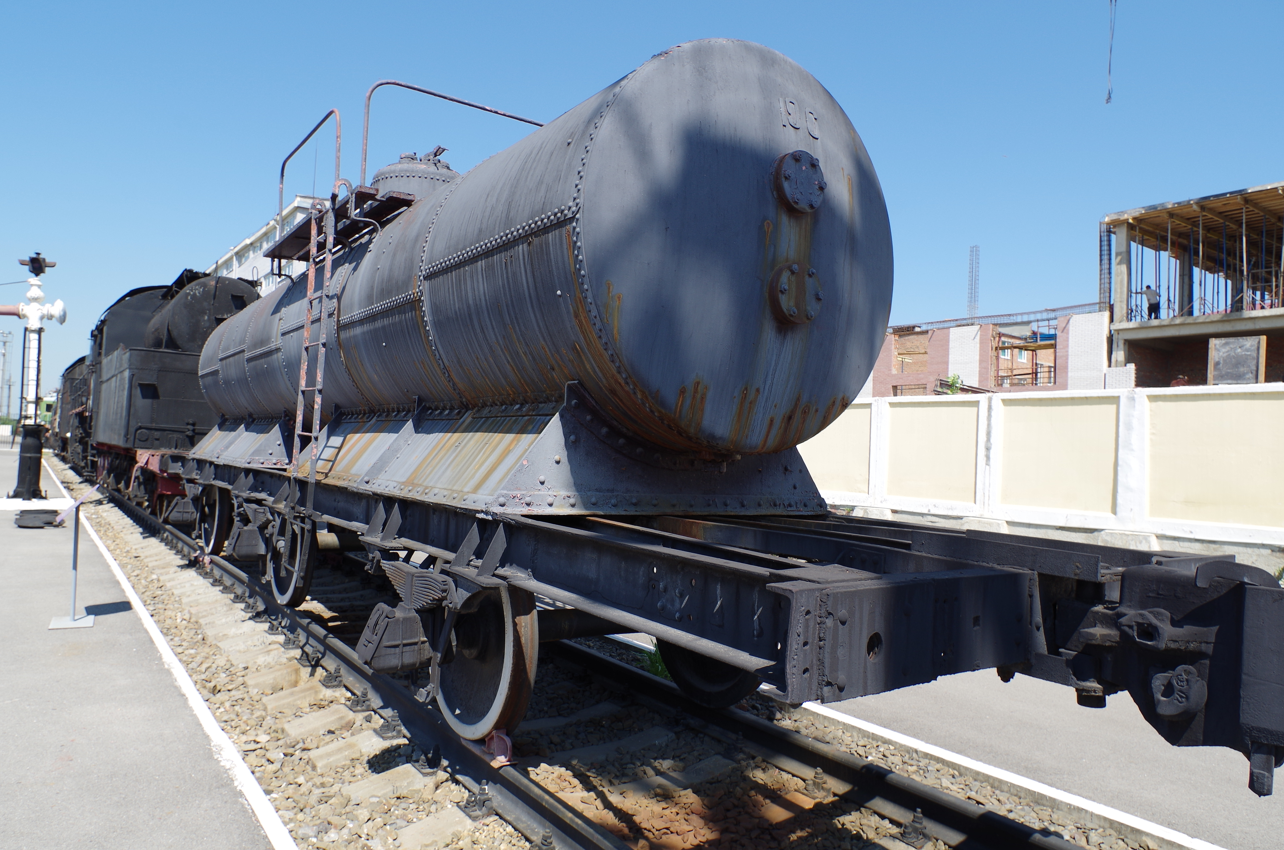 Трёхосная цистерна, 1901 года постройки, эксплуатировалась до 40-х годов, стационарно - до 2003 г на ст. Лихая. Единственный экземпляр, сохранившийся на территории железных дорог бывшего СССР.